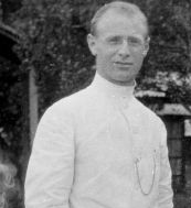 Repronegatief. Portret van zendeling Dr. A.C. Kruyt met familie in de tuin, Nederlands-Indië (detail: Johannes Kruyt)